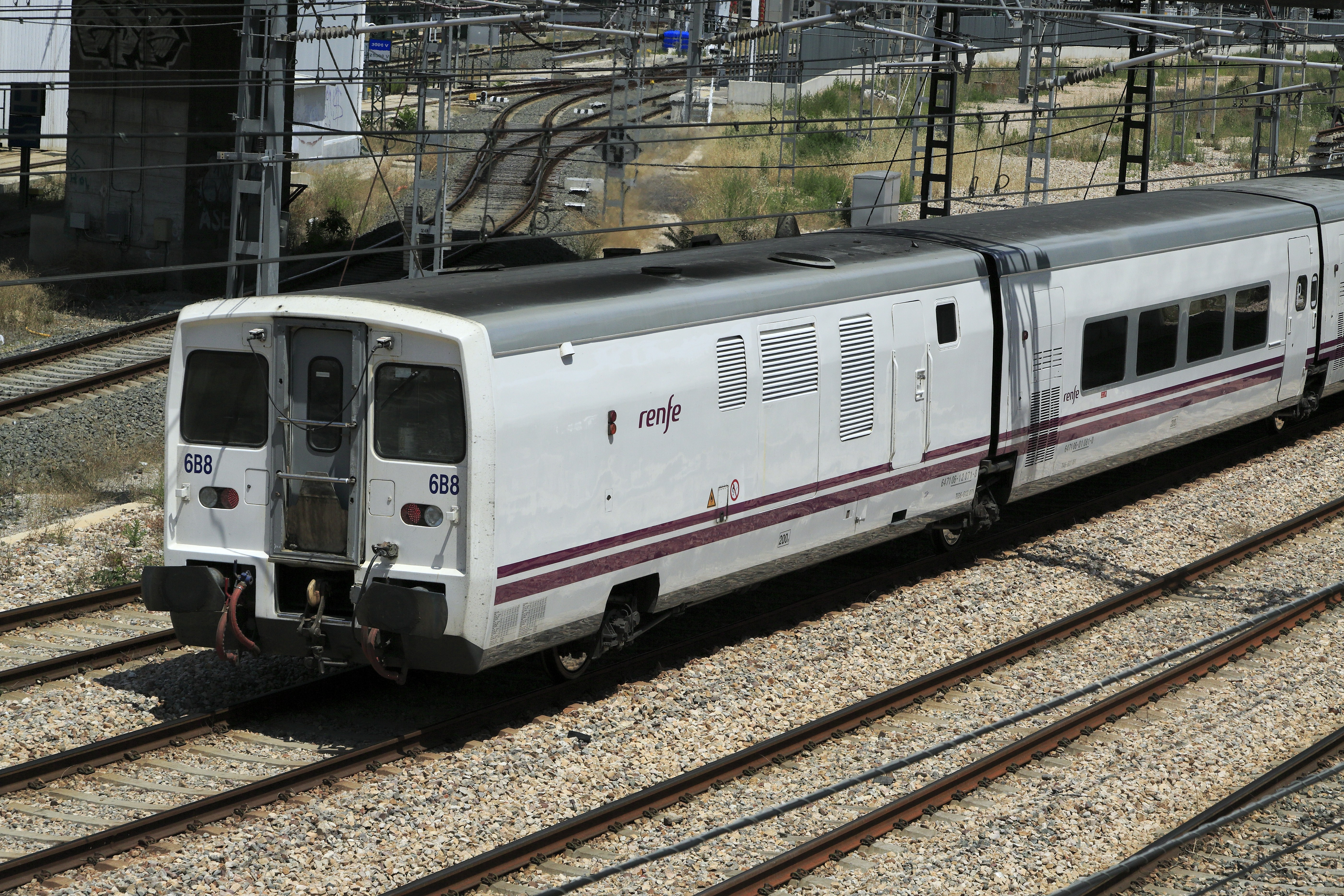 Talgo 460 »Mare nostrum« Lorca-Sutullena–Barna Sants, zwischen Alicante und Valencia läuft der Genertorwagen am Zugschluss.Das rechte Stirnwandfenster hat einen Scheibenwischer, dahinter befindet sich ein Führerstand mit Wendezugsteuerung. Bei diesem Zuglauf ist sie wegen der fehlenden Umsetzmöglichkeit im Bahnhof Alicante San Gábriel zwischen Alicante Terminal und San Gábriel erforderlich.